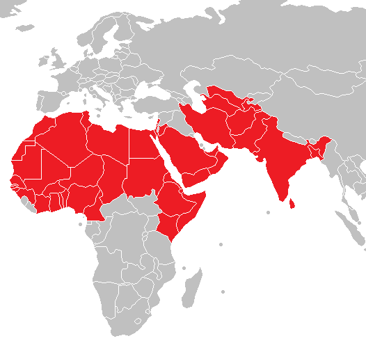 Distribution of Echis-species